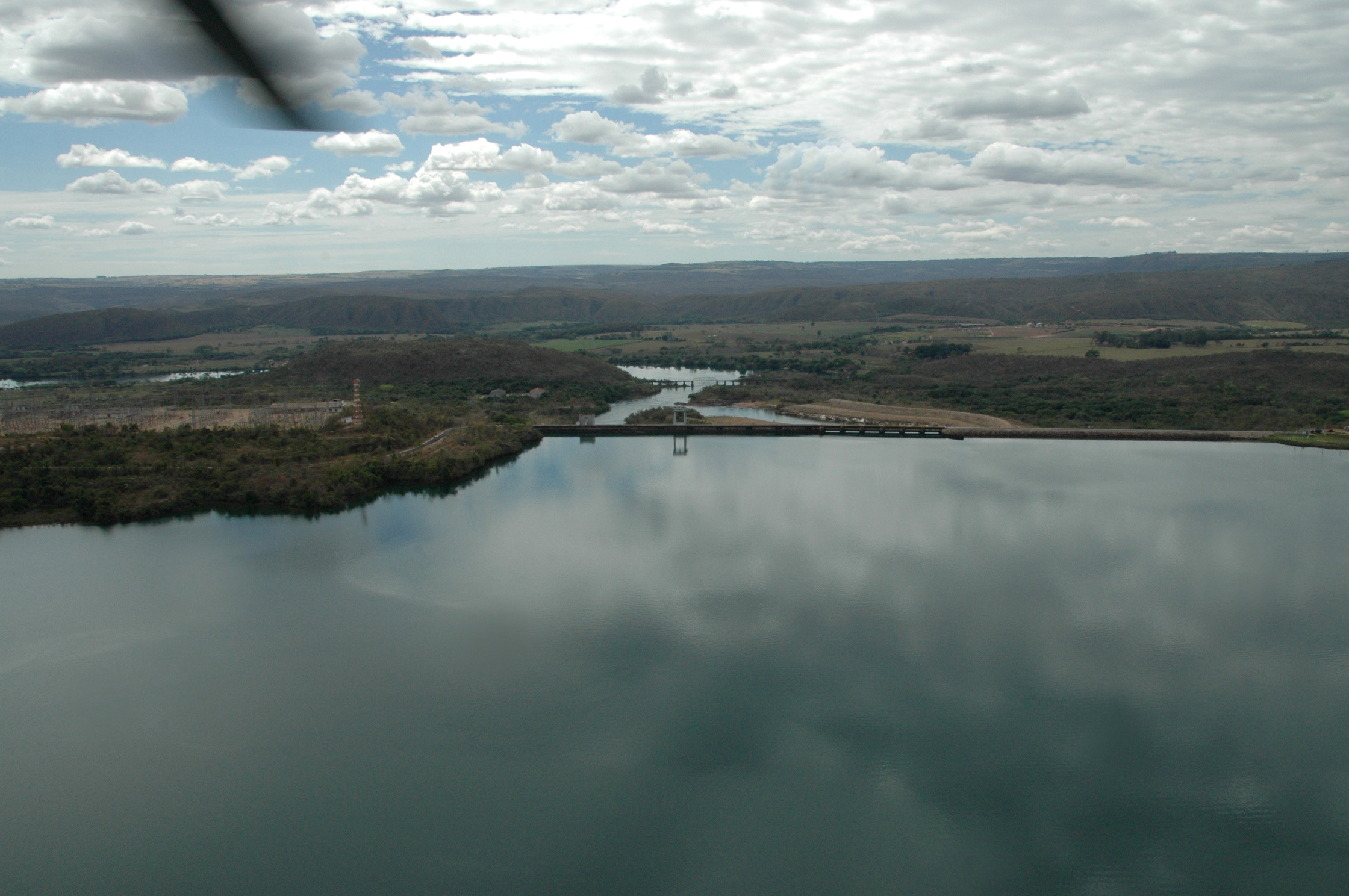 Barragem da Usina